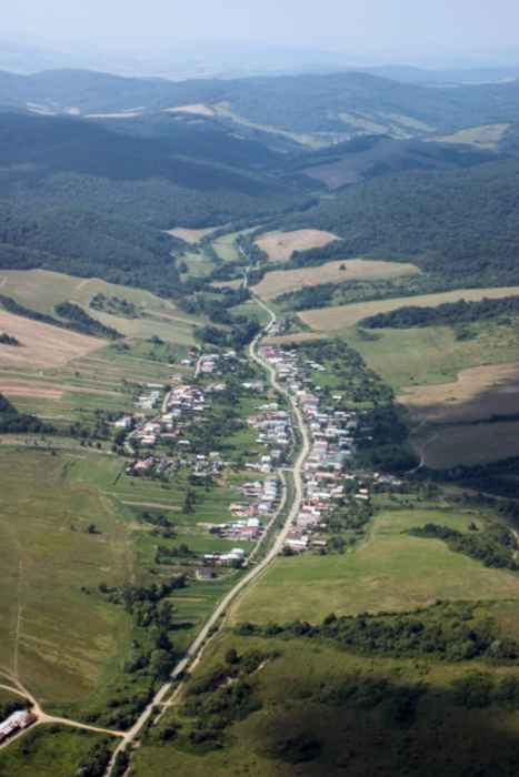 Ďapalovce Nahľad obce